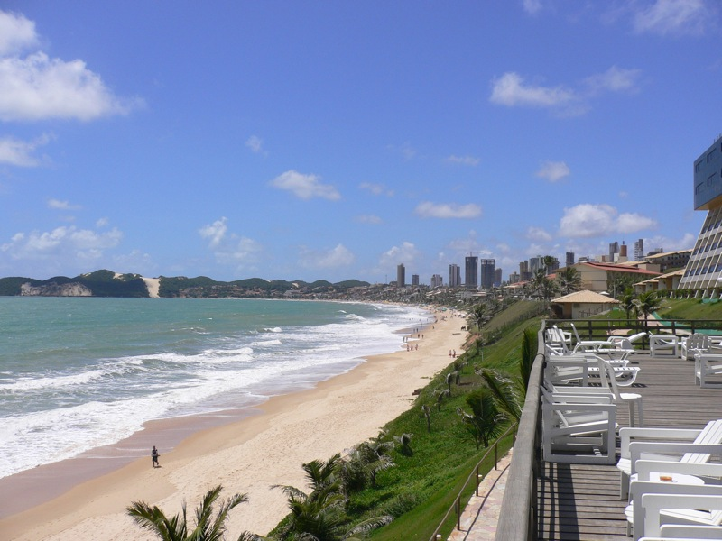 Vista panorâmica do bairro Ponta Negra e da praia de Ponta Negra em Natal, Rio Grande do Norte, Brasil. Panoramic sight of the Ponta Negra quarter and the Ponta Negra beach in Natal, Rio Grande do Norte, Brazil.